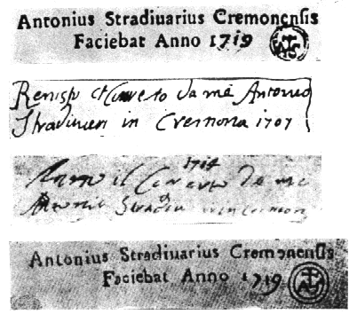 Geigenzettel von Stradivari, Public Domain